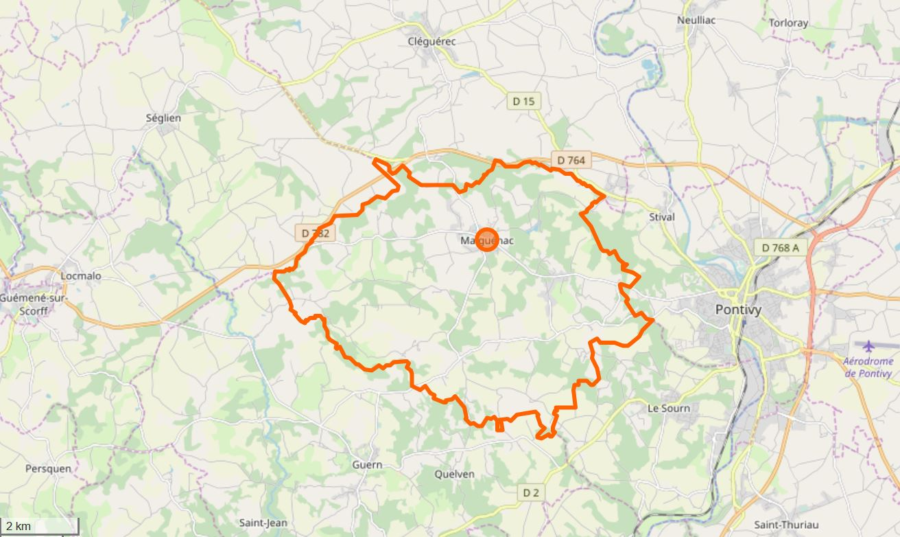 Cette carte a été créée à partir des données du projet Openstreetmap. This map may be incomplete, and may contain errors. Don't rely solely on it for navigation.